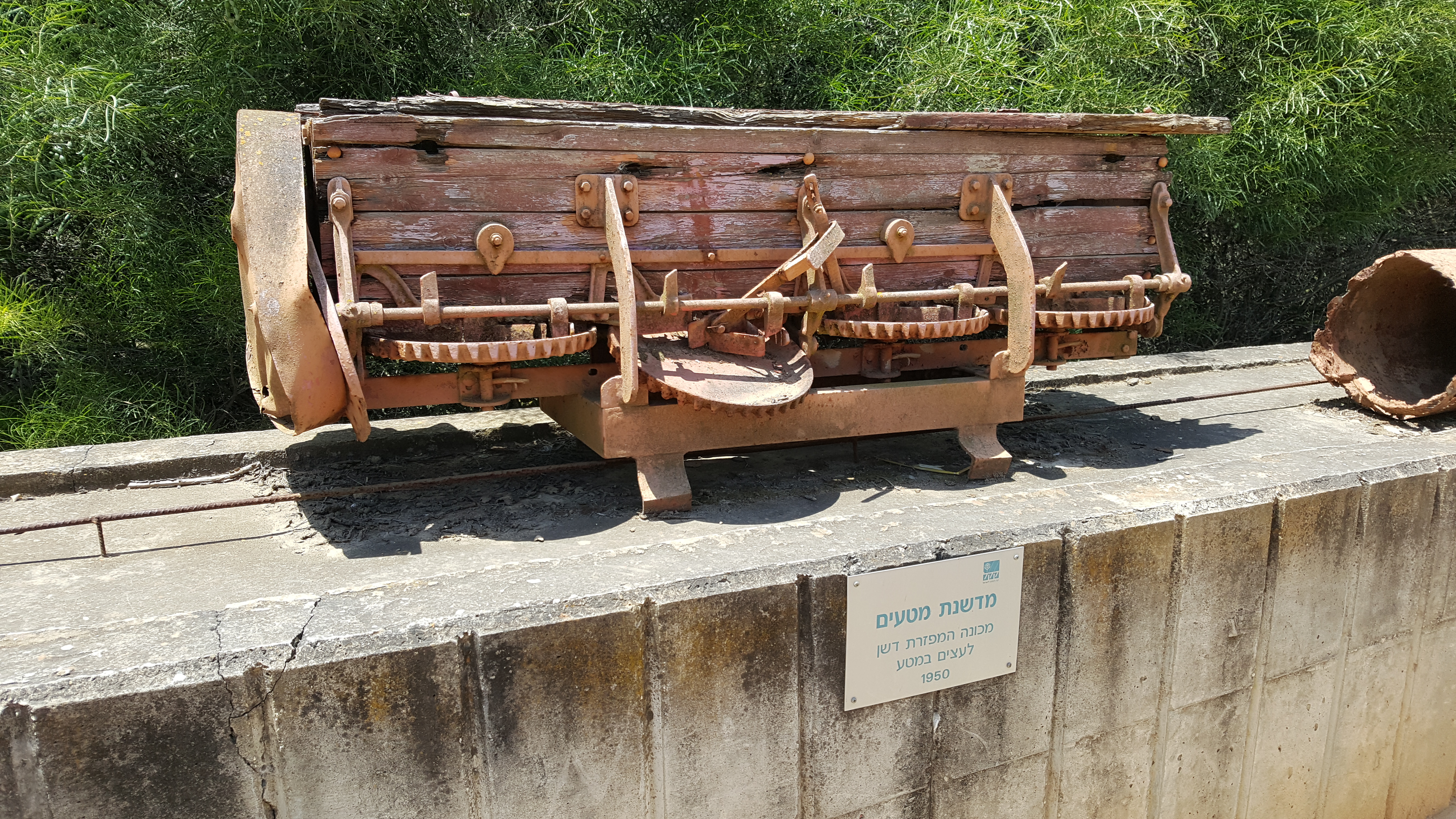 מנסיון ההתיישבות הראשון ברוחמה נותרה רק הבאר שנחפרה בשנת 1913. לידה נמצא בית בטון שנבנה בשנות ה-40 של המאה ה-20 ושימש כבית ביטחון.